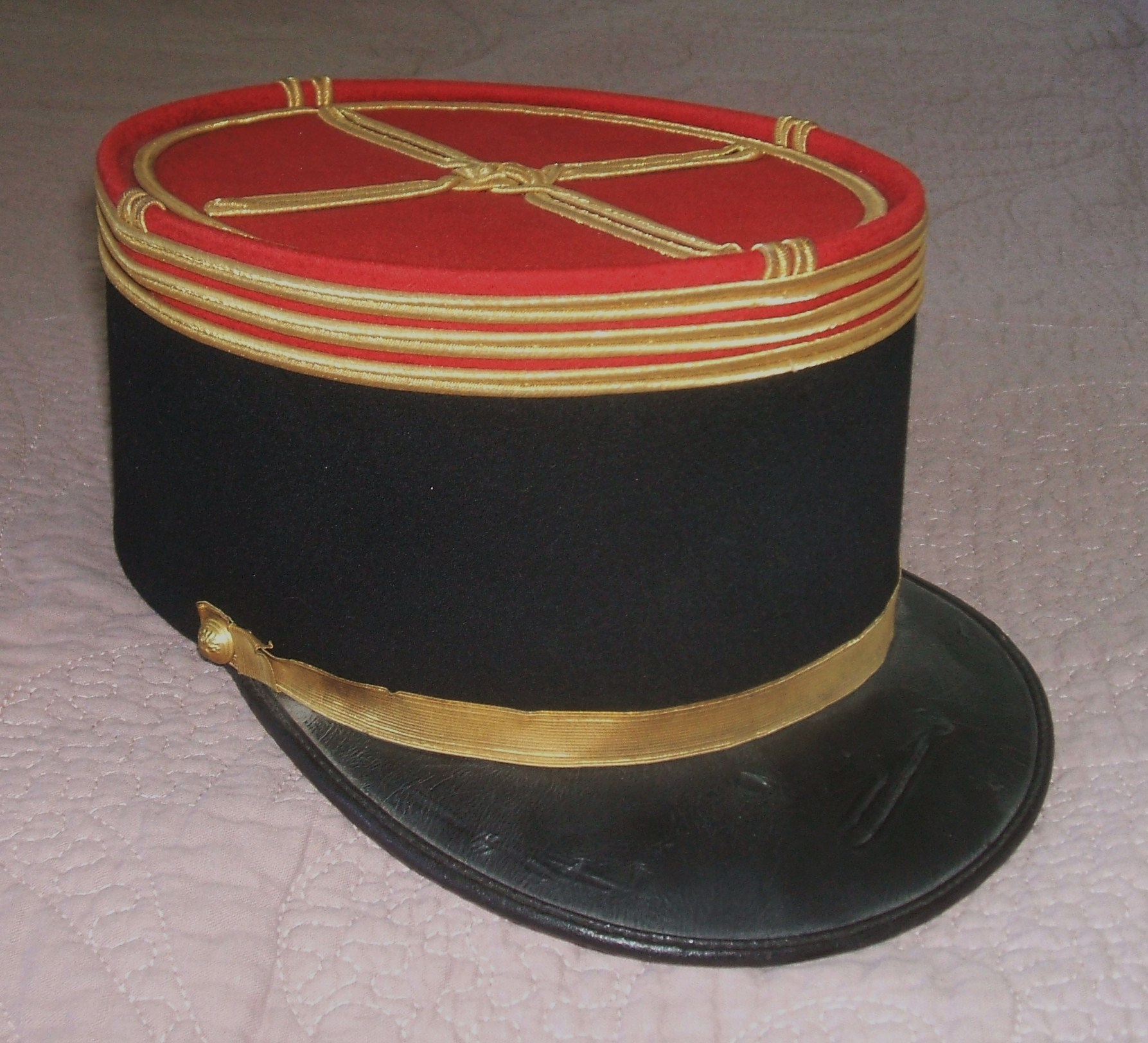 Képi du capitaine de réserve Louis Miniac (1887-1952), officier du 247ème régiment d'infanteire, basé à Saint-Malo, Ille-et-vilaine, France. Collections successives de la famille Miniac : Louis Miniac, Marie Miniac (1897-1982), Paul Miniac (1927-1995), Marie-Anne Miniac.